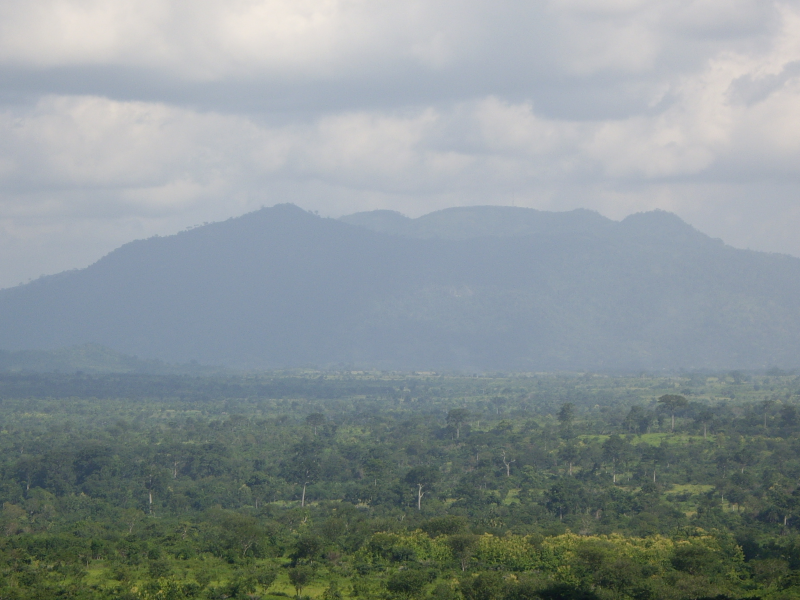 Mont Agou photographié depuis Lavié-Agoviépé (au TOGO)